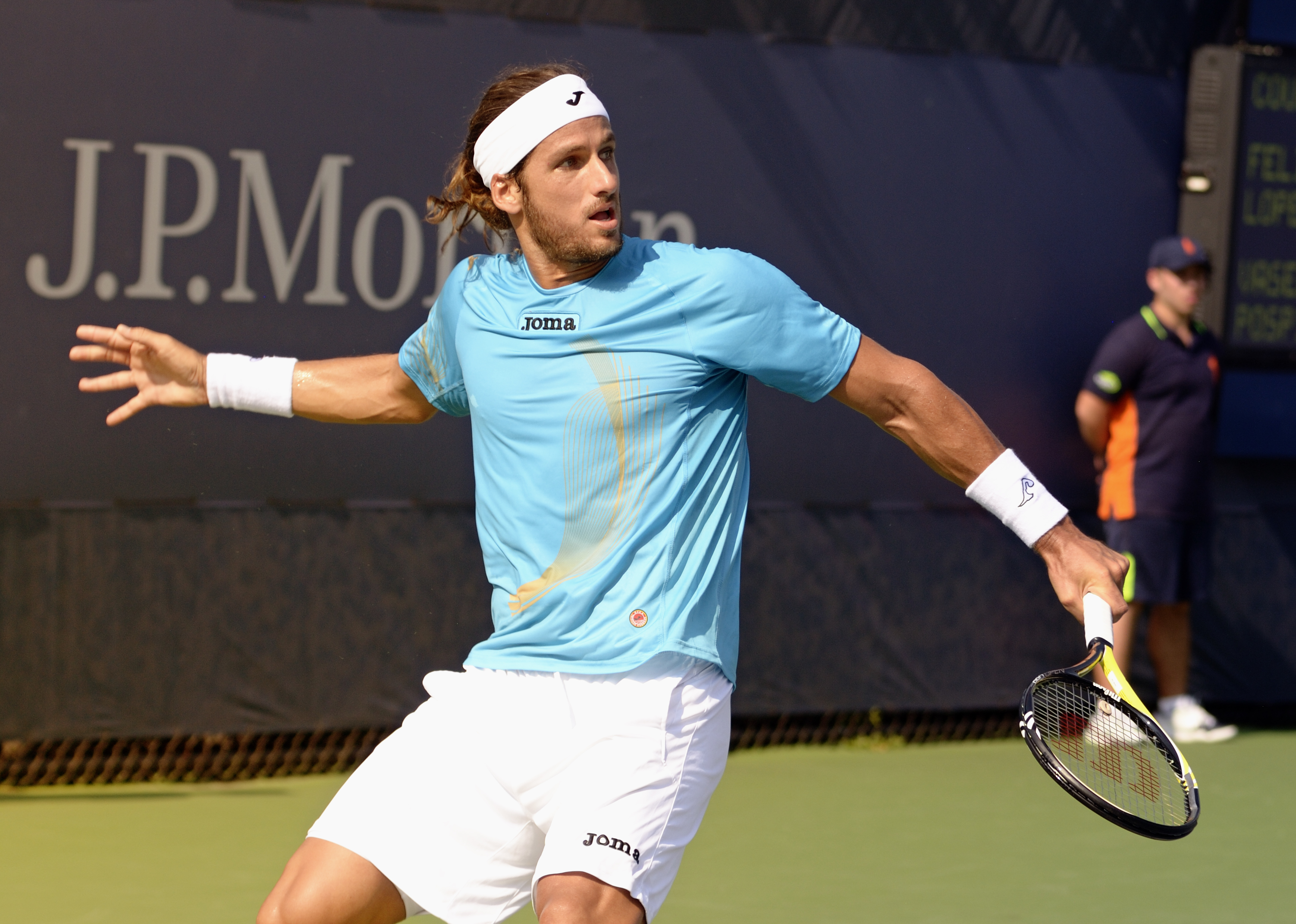 deliciano